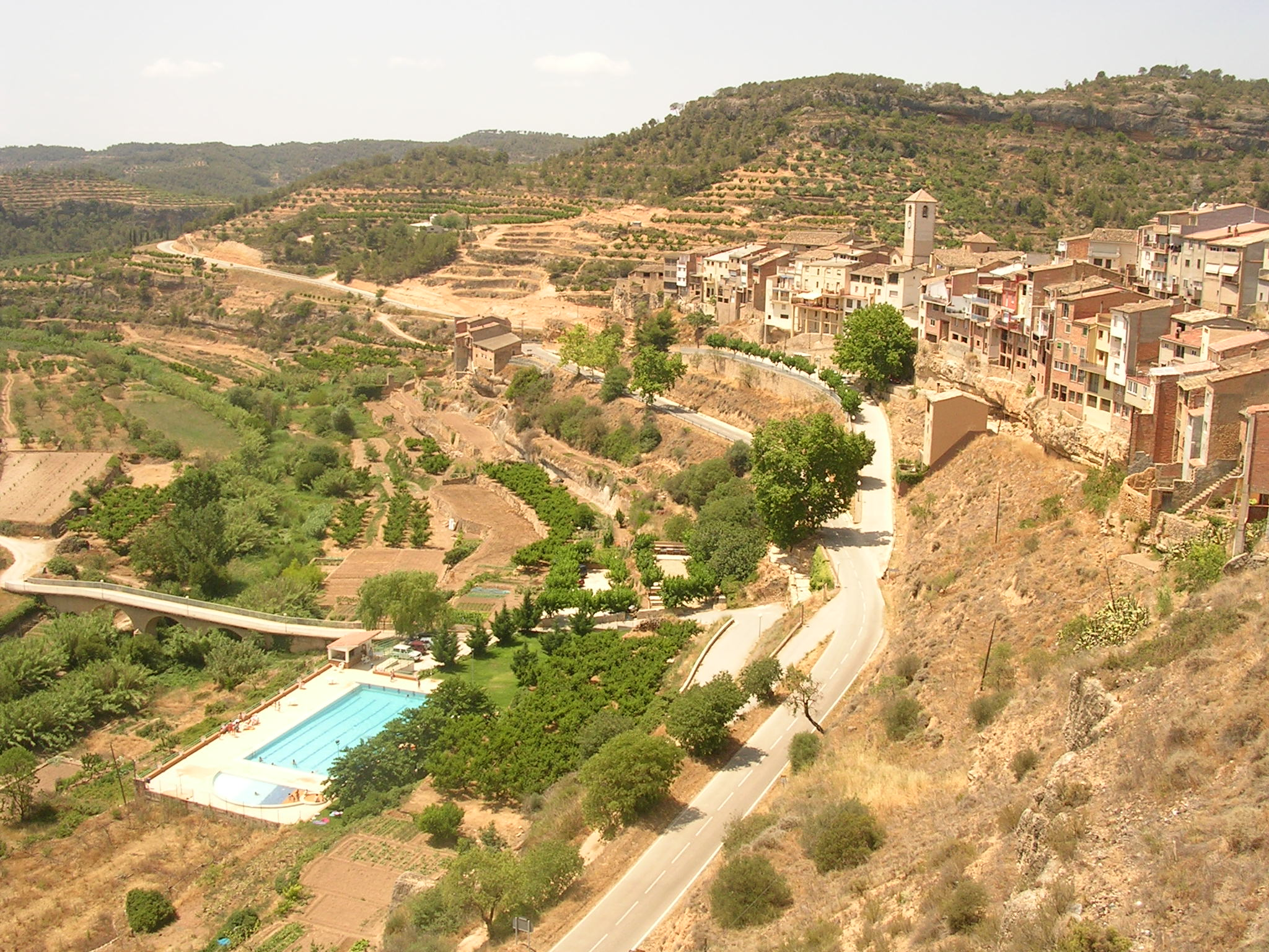 La Bisbal de Falset